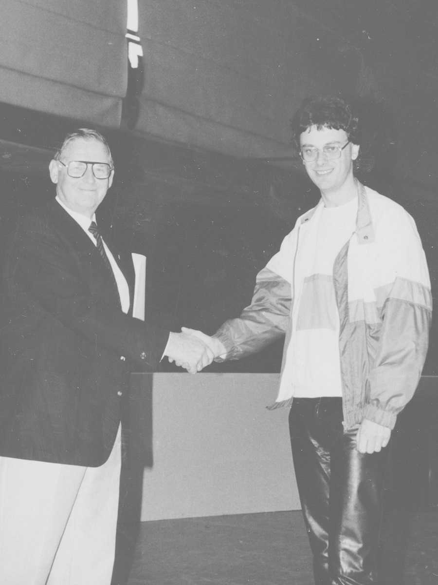 Helmut Nöttger und John Nunn, Siegerehrung der offenen deutschen Meisterschaft 1986 in Krefeld.